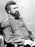 Francesco "Francis" Maria Scala